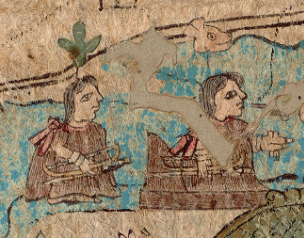 Fragmento del Códice Xolotl, lámina 2, donde aparece el gobernante Nopaltzin (a la izquierda) acompañado de su padre Xolotl (a la derecha).